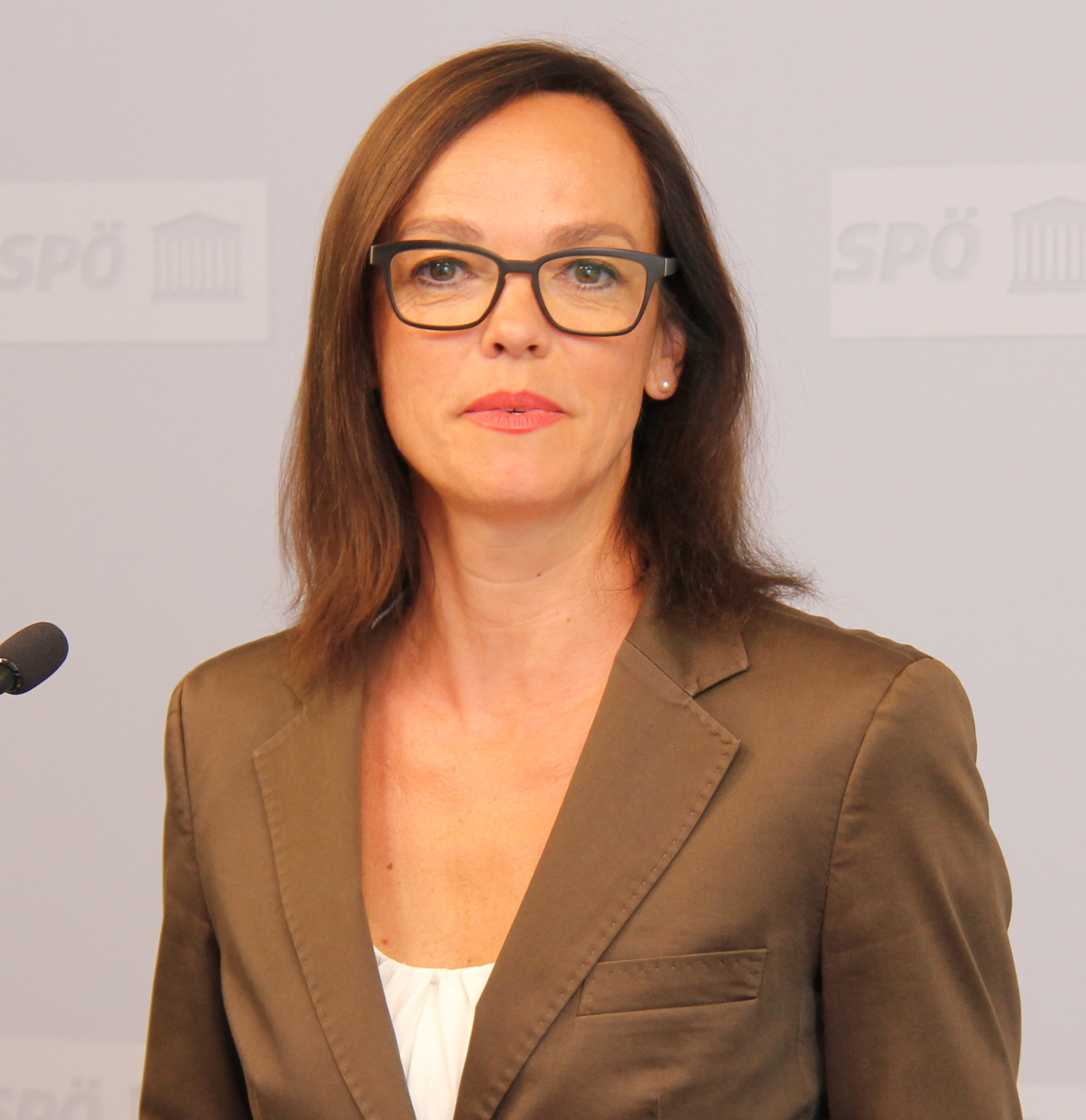 Pressekonferenz mit SPÖ-Bildungssprecherin Sonja Hammerschmid, 9. August 2018